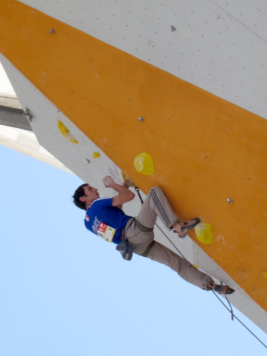 Romain Desgranges en demi-finale du championnat d'Europe d'escalade (difficulté) 2013 à Chamonix